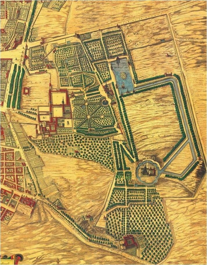 Detalle del Palacio y jardines del Buen Retiro, en el Plano de la villa de Madrid, dibujado por Pedro Teixeira Albernaz en 1656, por encargo de Felipe IV de España. Se identifican sus calles, plazas y edificios, muchos señalados con sus nombres. El plano está realizado en perspectiva caballera, de sur a norte. Está grabado en 20 planchas de 45x56 cm cada una, midiendo 2,85 x 1,80 metros, a una escala de 1:1.800.